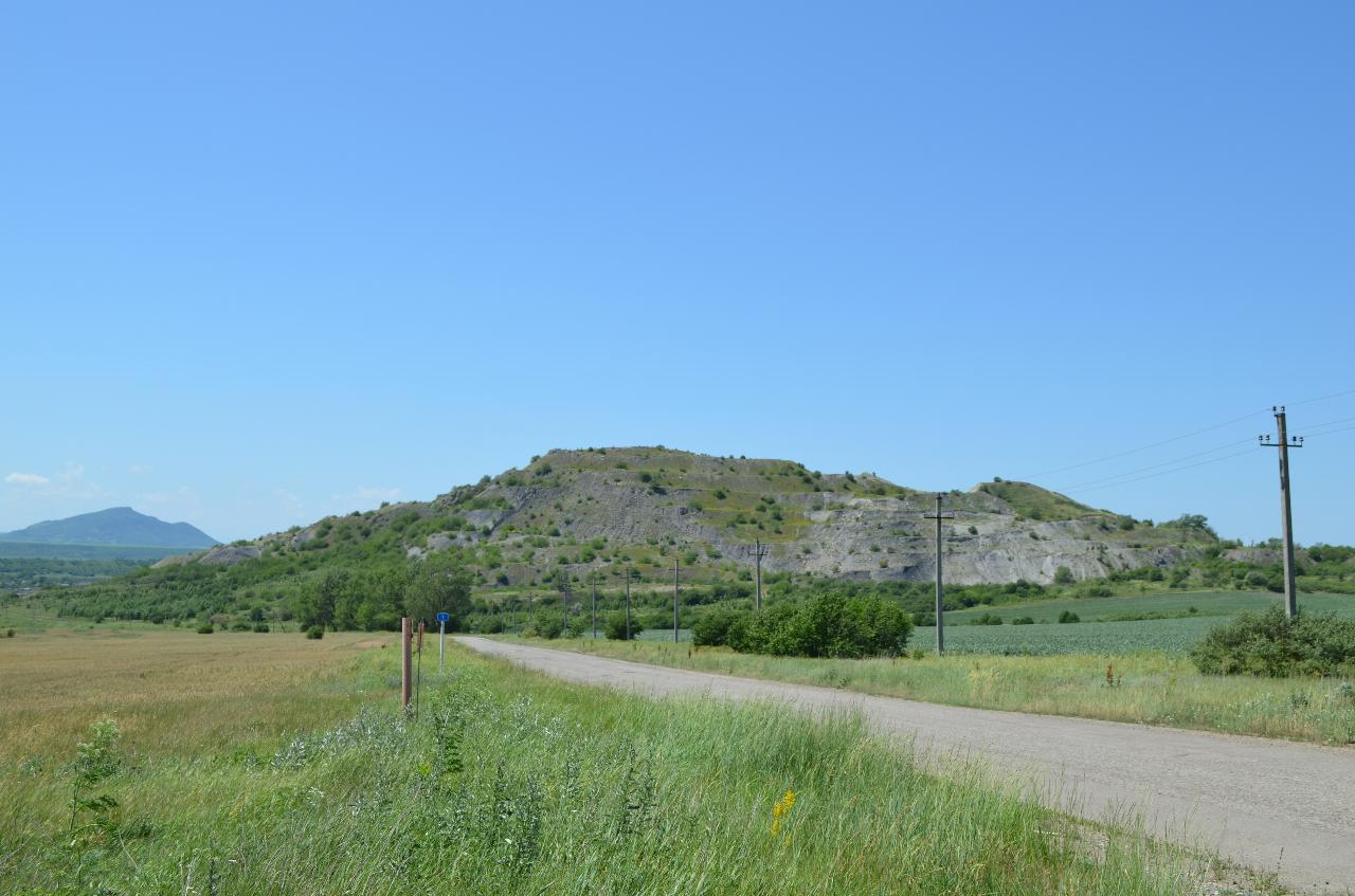 Гора Кинжал неподалёку от города Минеральные Воды. Вид с северо-востока, с дороги, ведущей в Кумагорск